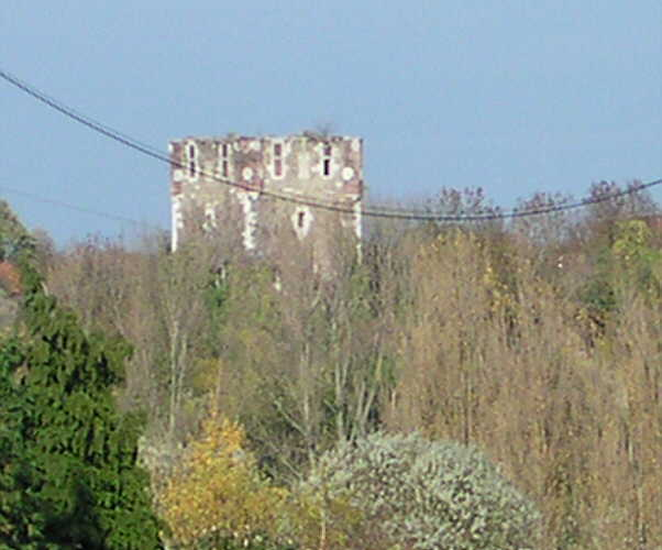 Ruine des Burgturms in Saive (gehört zu Blegny bei Lüttich)